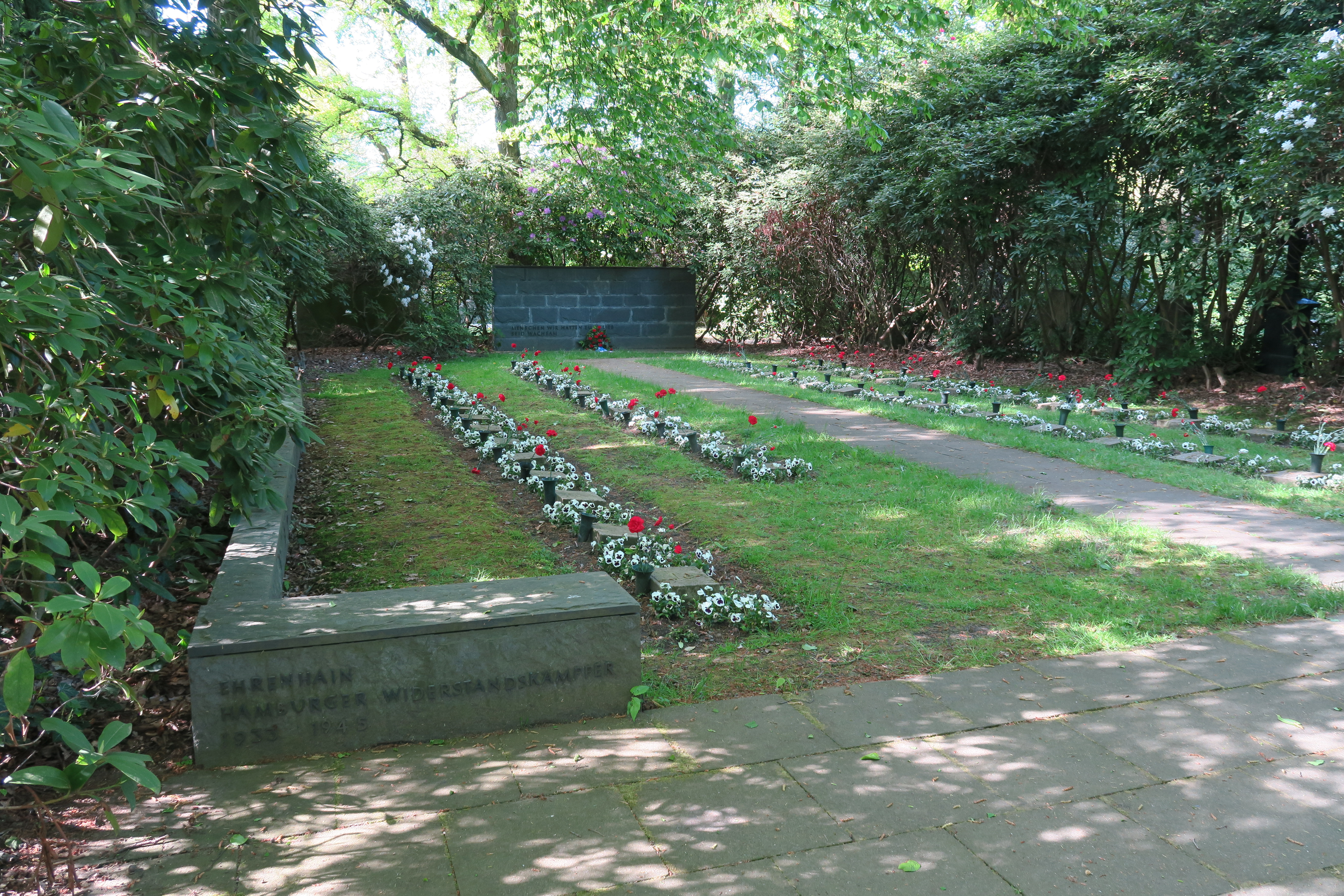 Ehrenhain der Hamburgischen Widerstandskämpfer auf dem Friedhof Ohlsdorf in Hamburg